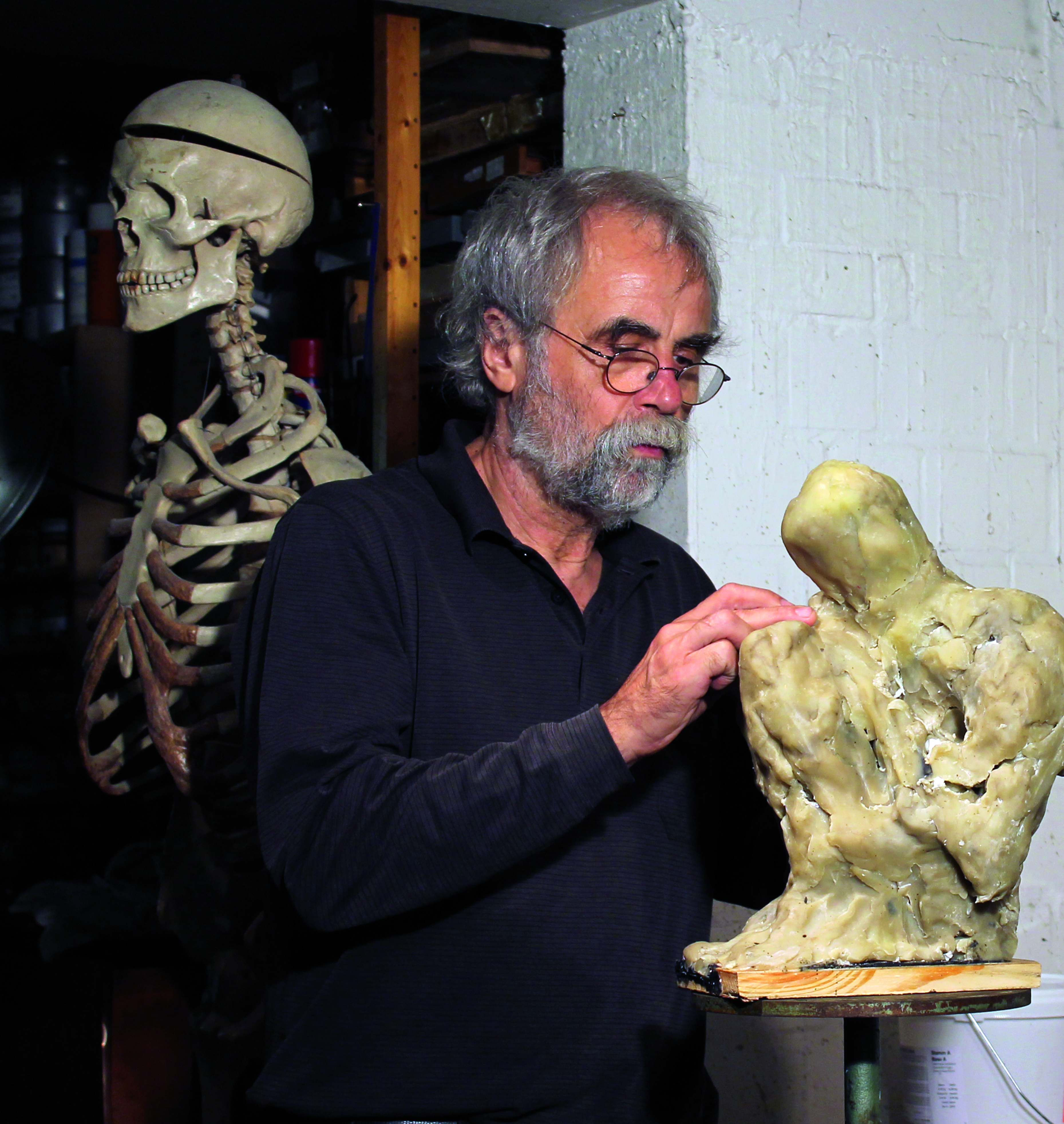 Peter Marggraf arbeitet an einem Wachsmodell für den Bronzeguss in seiner Werkstatt in Bordenau, einem Ortsteil von Neustadt a. Rbge.